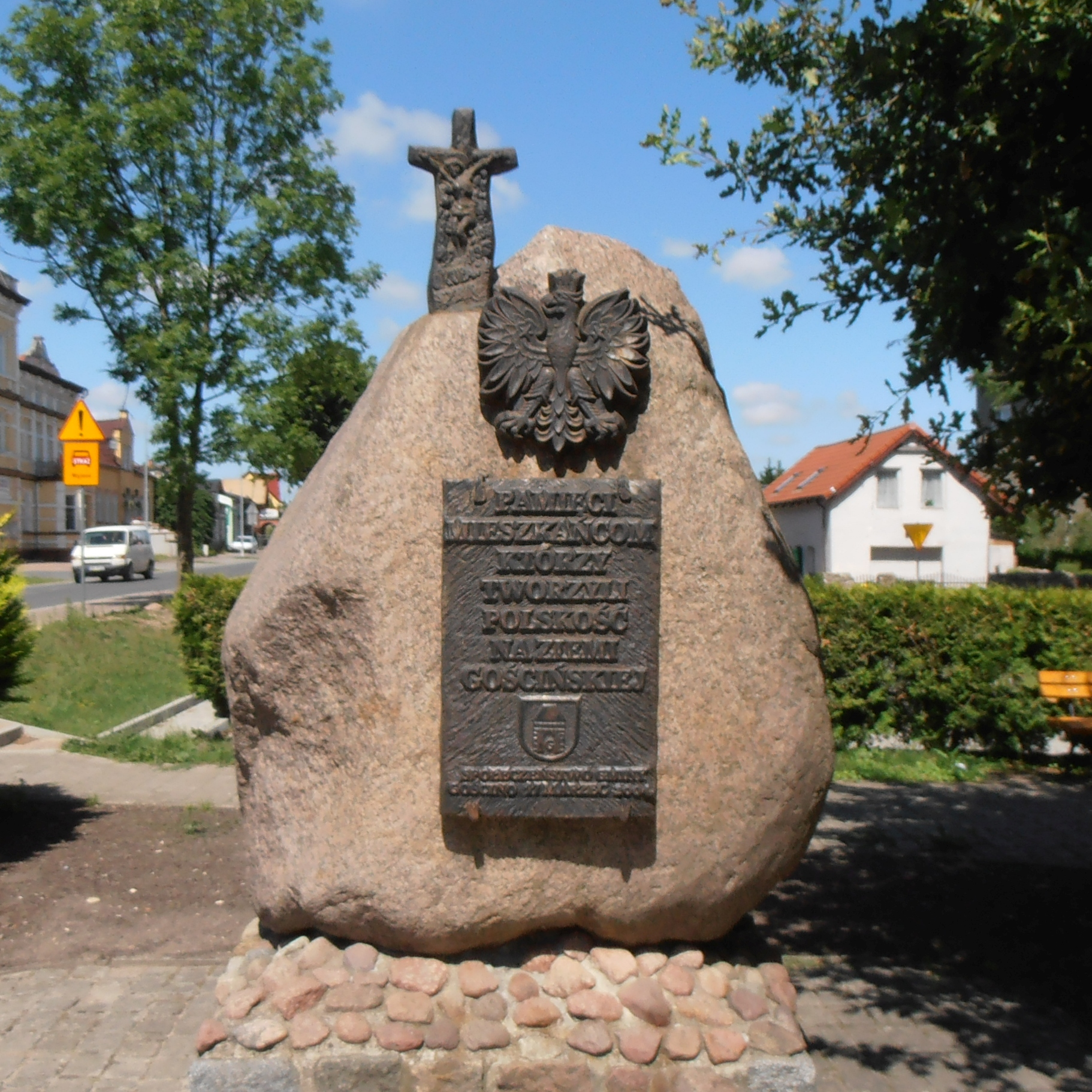 Gościno. Kamień pamiątkowy na skwerze.